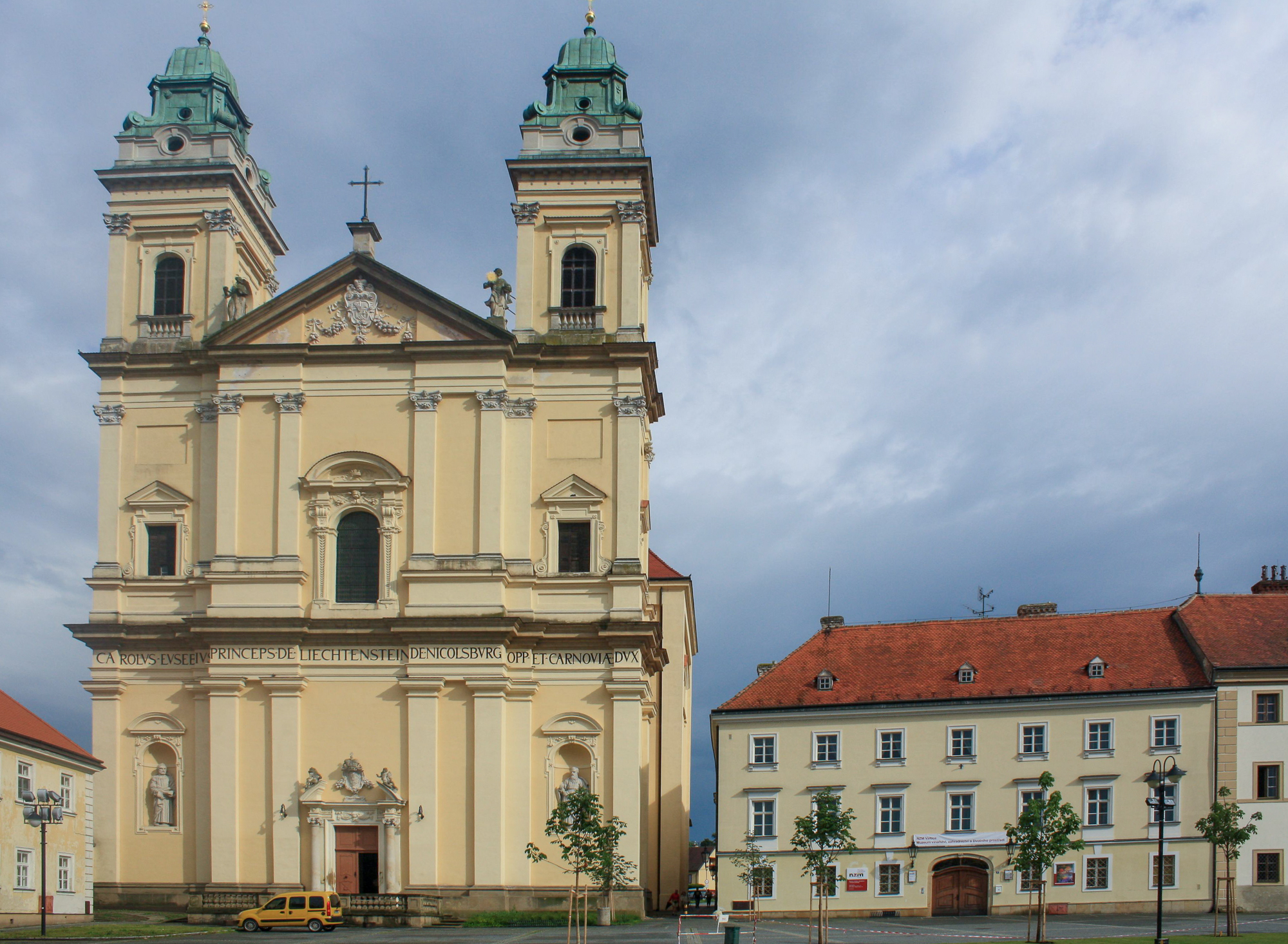 Pfarrkirche von Valtice